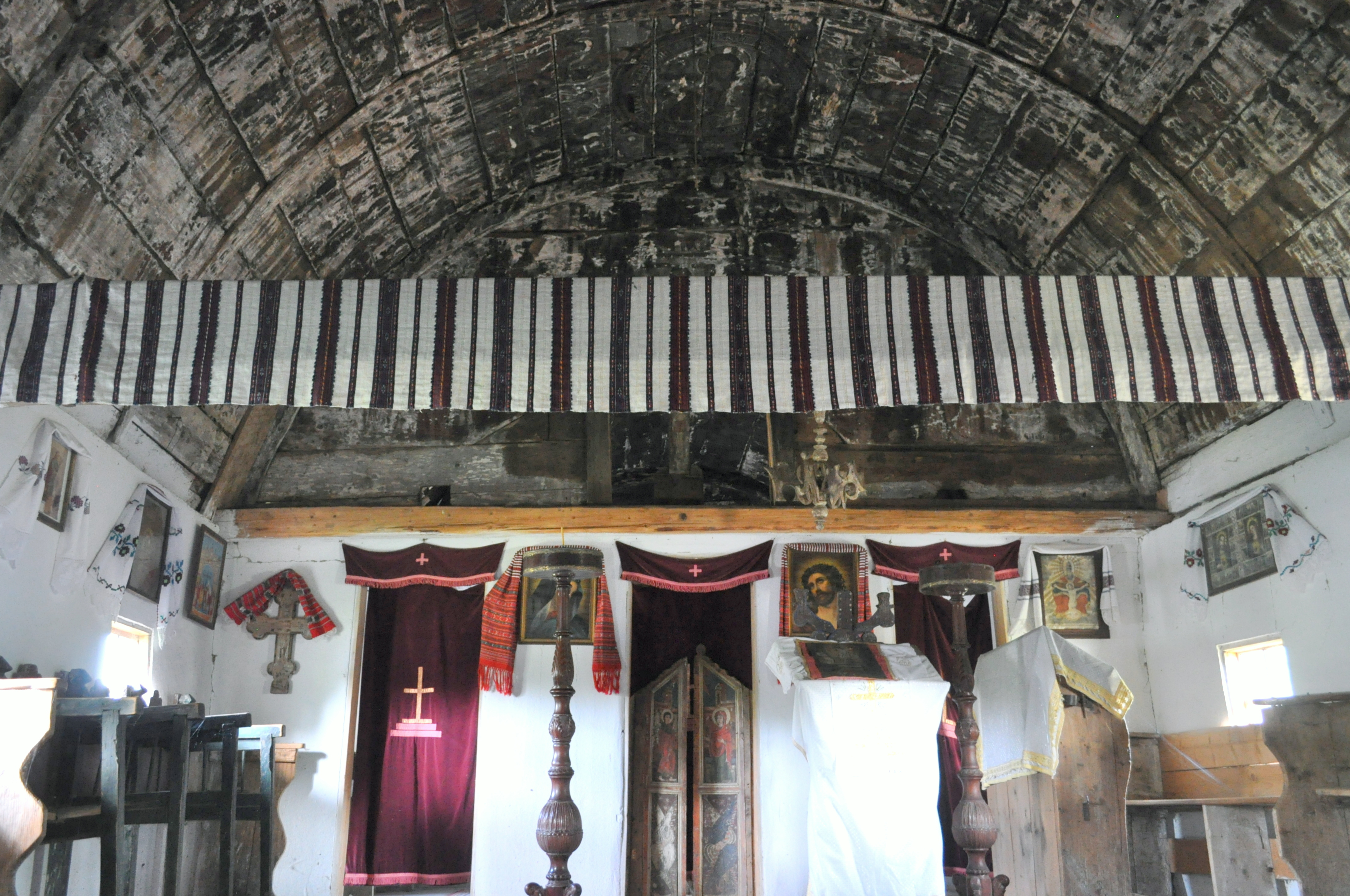 Biserica de lemn „Sfinții Arhangheli Mihail și Gavriil” din Sângătin, comuna Apoldu de Jos, județul Sibiu